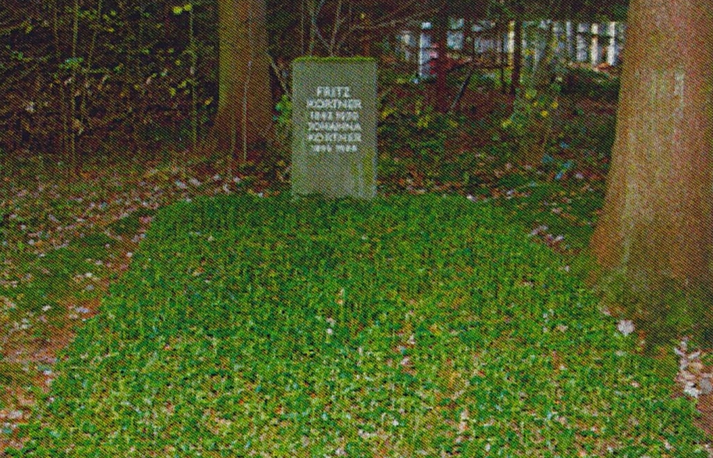 Waldfriedhof München-Fritz Kortner